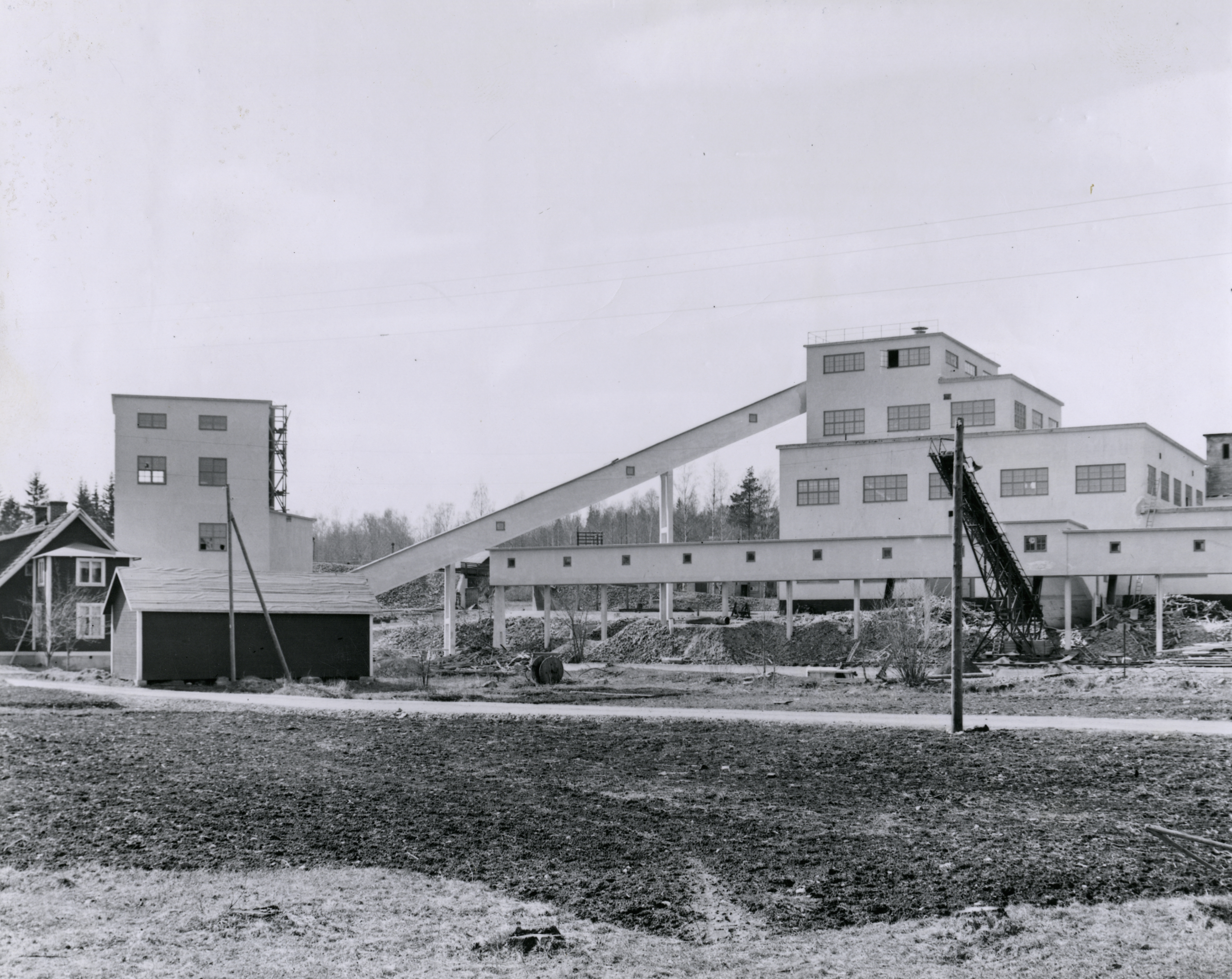 TEKA0147896 Anrikningsverk i Ställdalen, 1946.